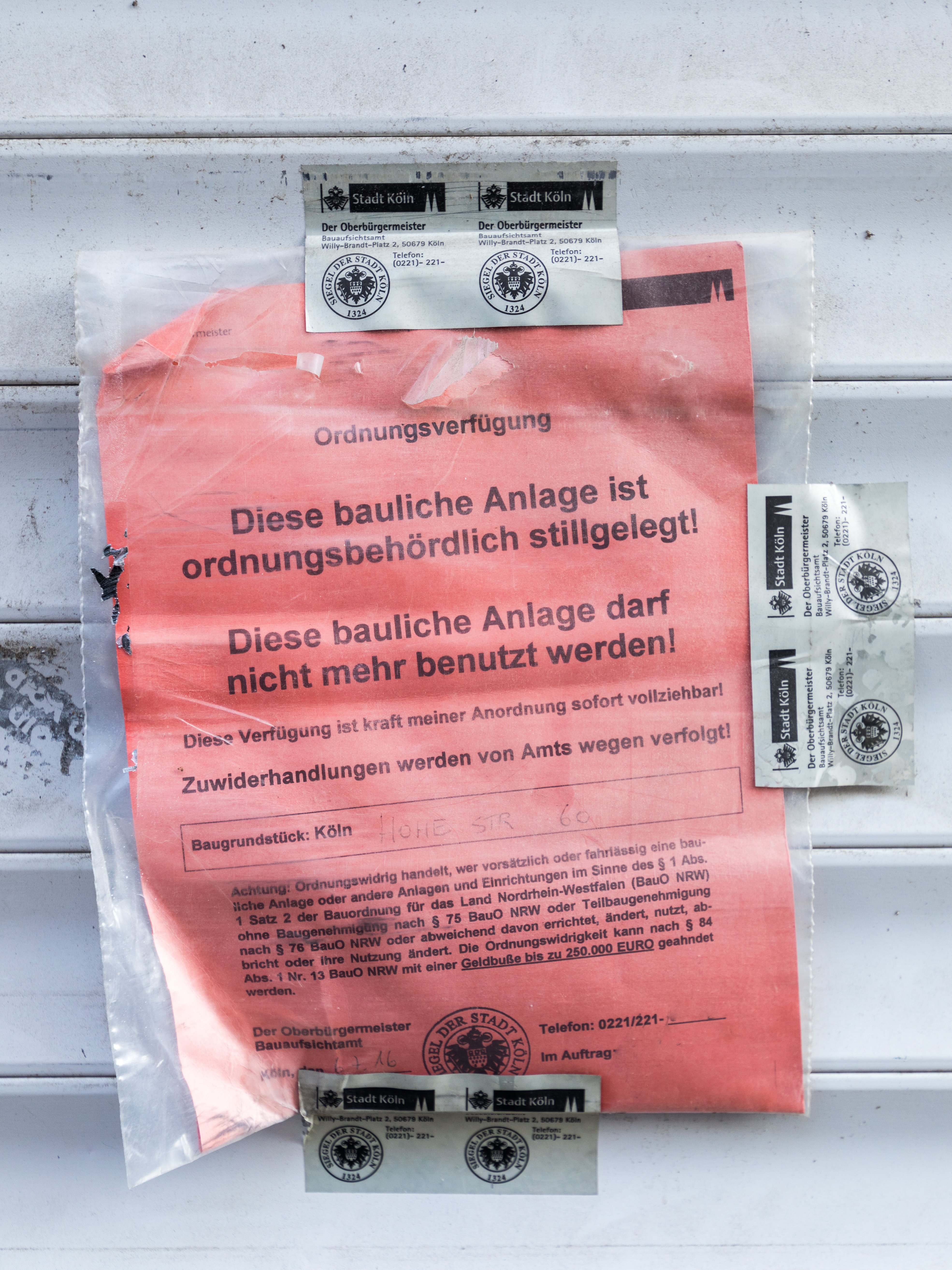 Ordnungsverfügung Stilllegung bauliche Anlage, Hohe Straße 60, Köln. Ausgestellt 6.7.16